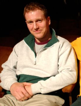 Ian Roberts